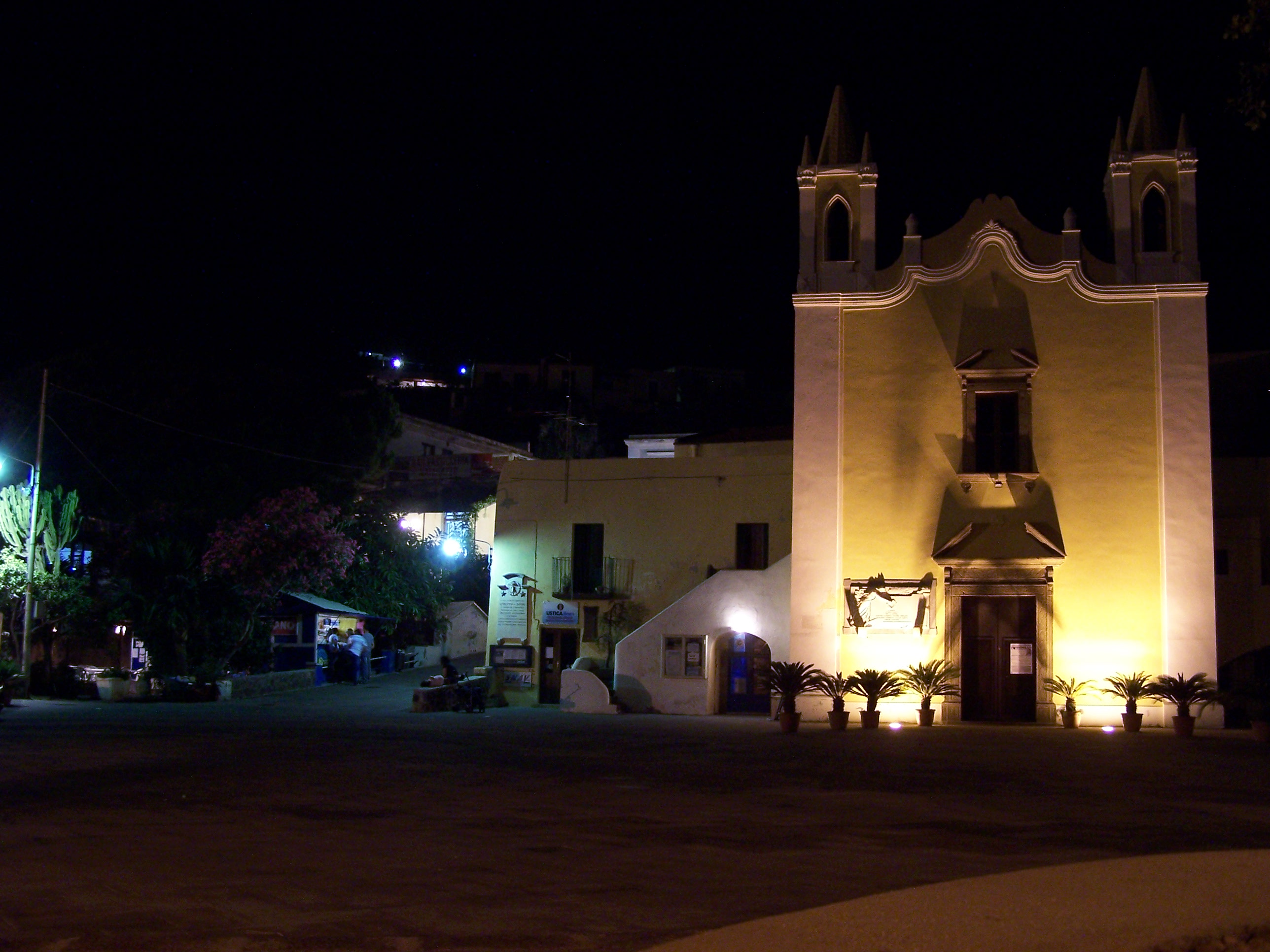 Piazza of Santa Marina di Salina at night